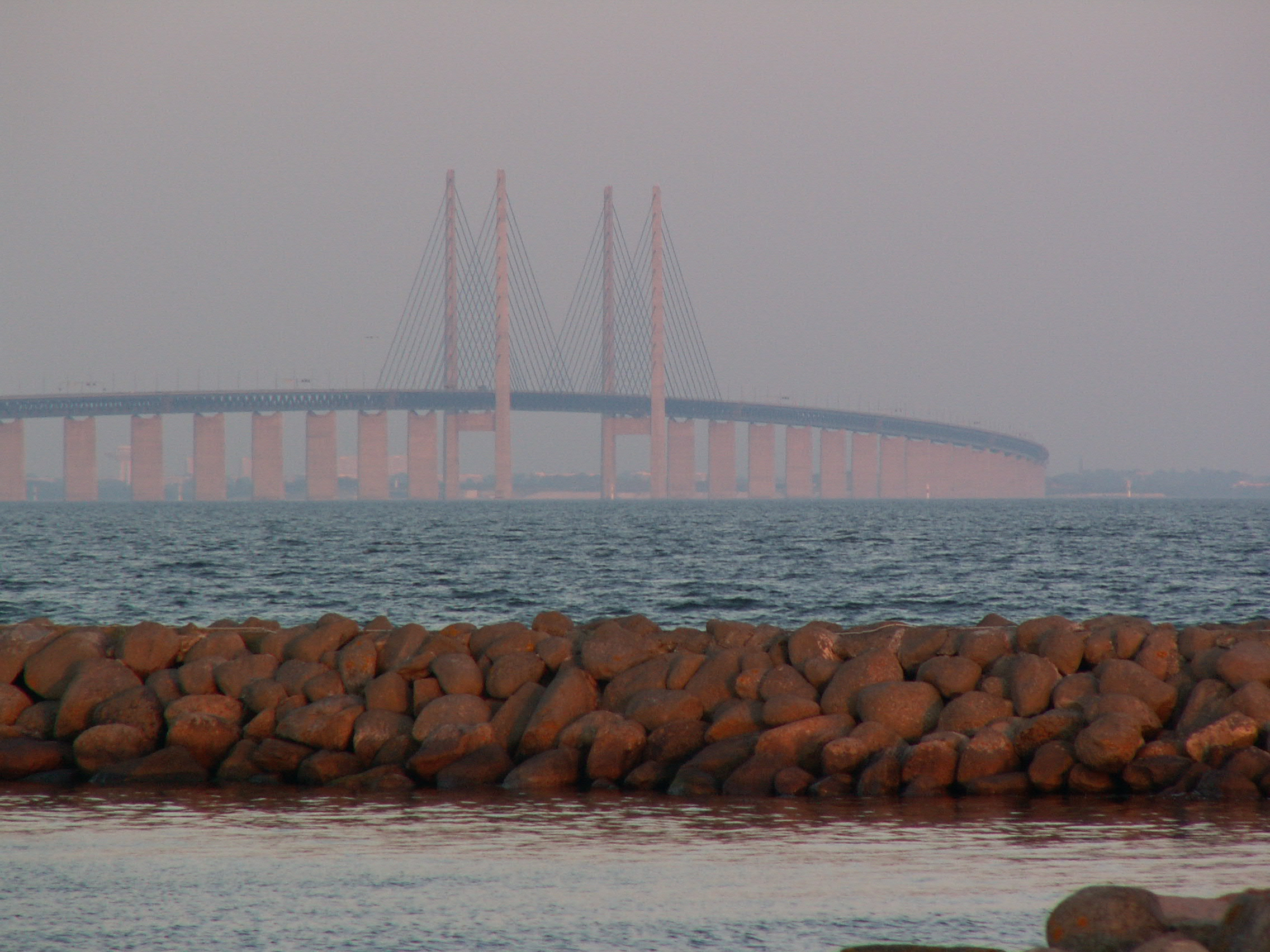 Öresundbrücke bei Malmö